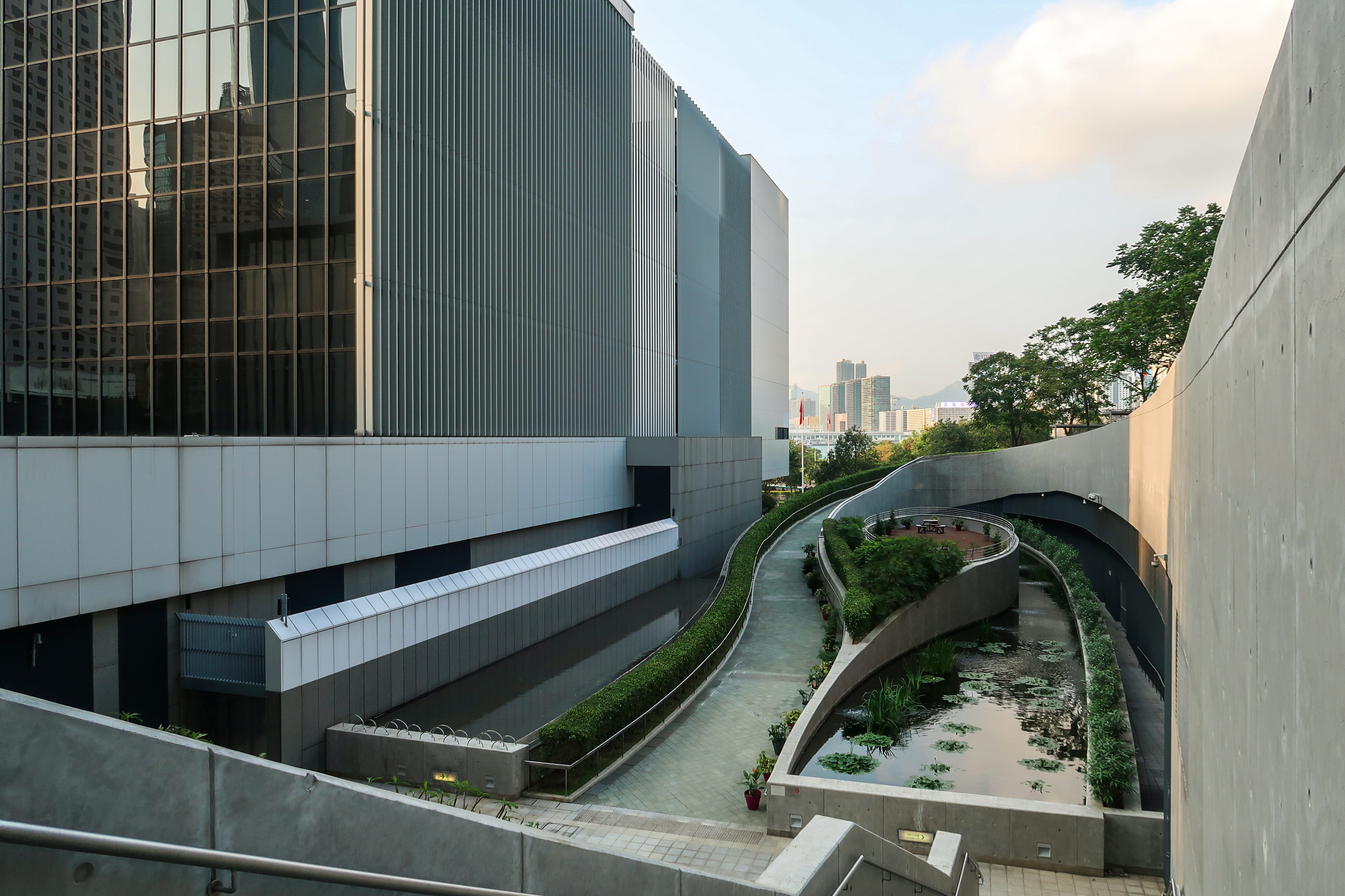 Tamar Park Pond